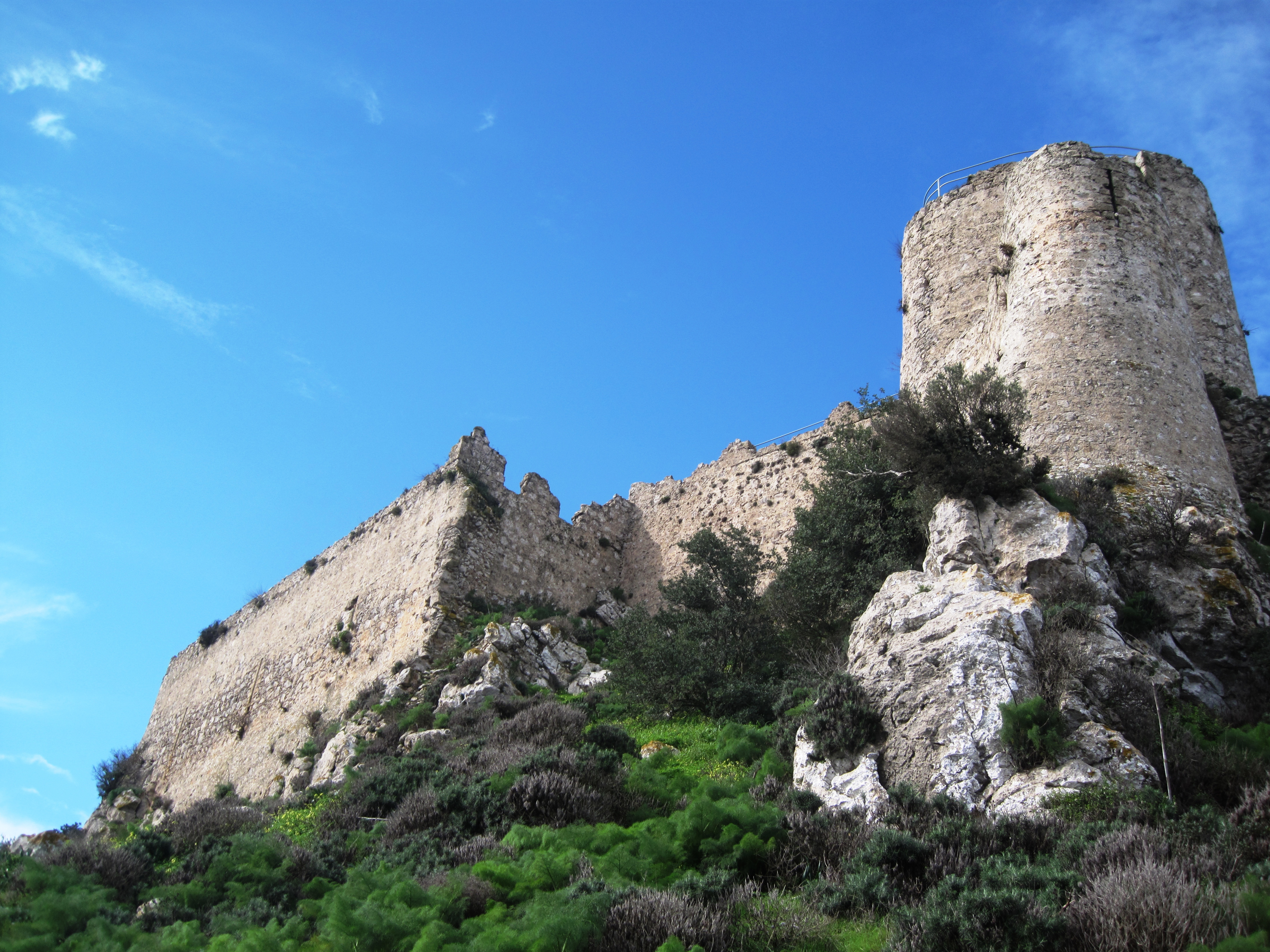 Kantaria kasteel